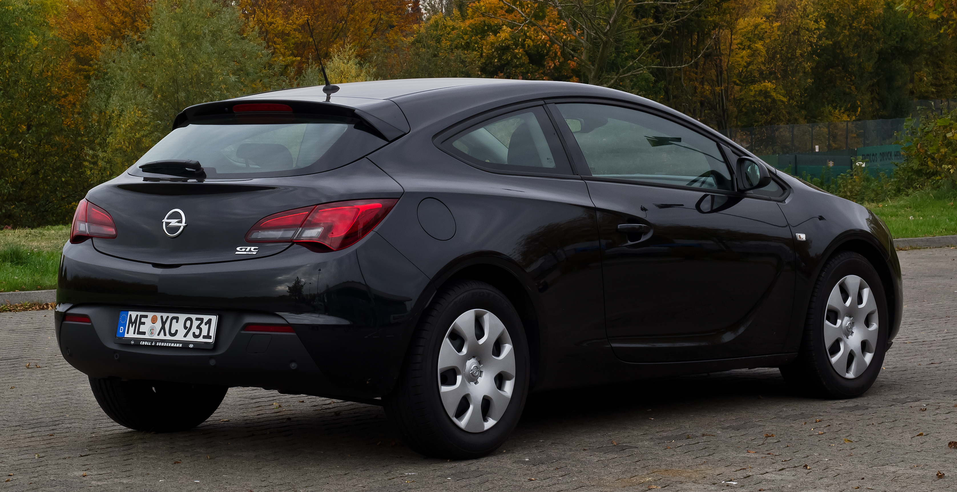 Opel Astra GTC 1.4 Turbo ecoFLEX Edition (J)